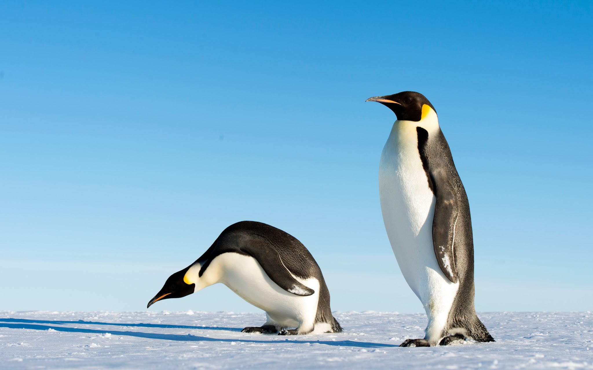 Emperor Penguins